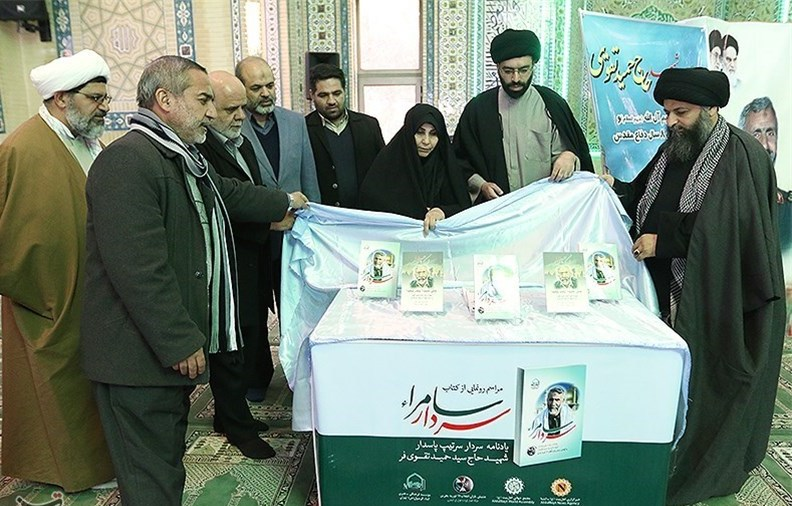 در اولین سالگرد حمید تقوی از سرداران مدافع حرم اهل بیت، کتاب‌های «سردار سامرا» و «عاش حمیدا و مات شهیدا» رونمایی شد.